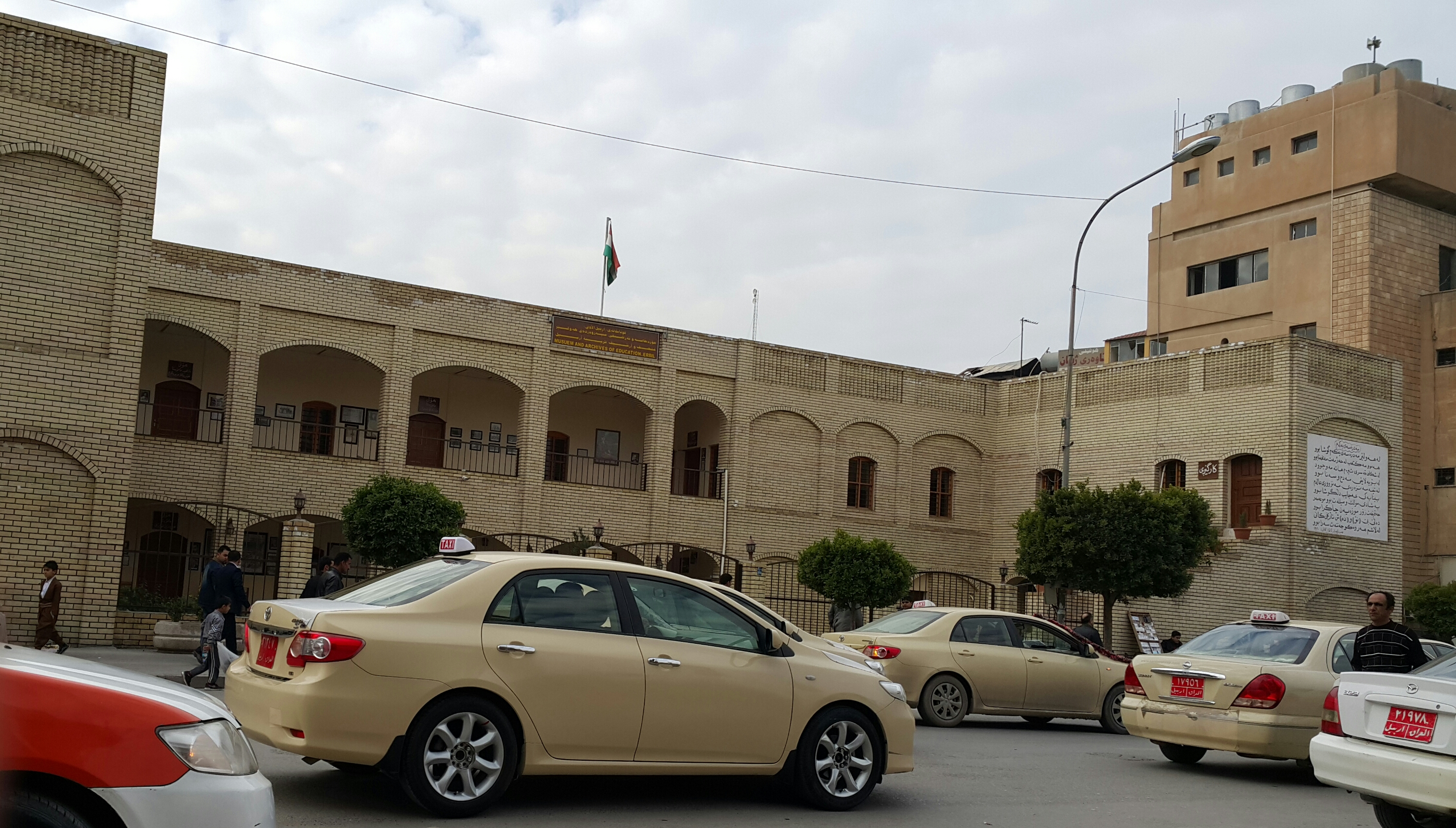 کوردی: یەکەمین قوتابخانە لەشاری هەولێر لە ئێستادا مۆزەخانەی پەروەردەیییە